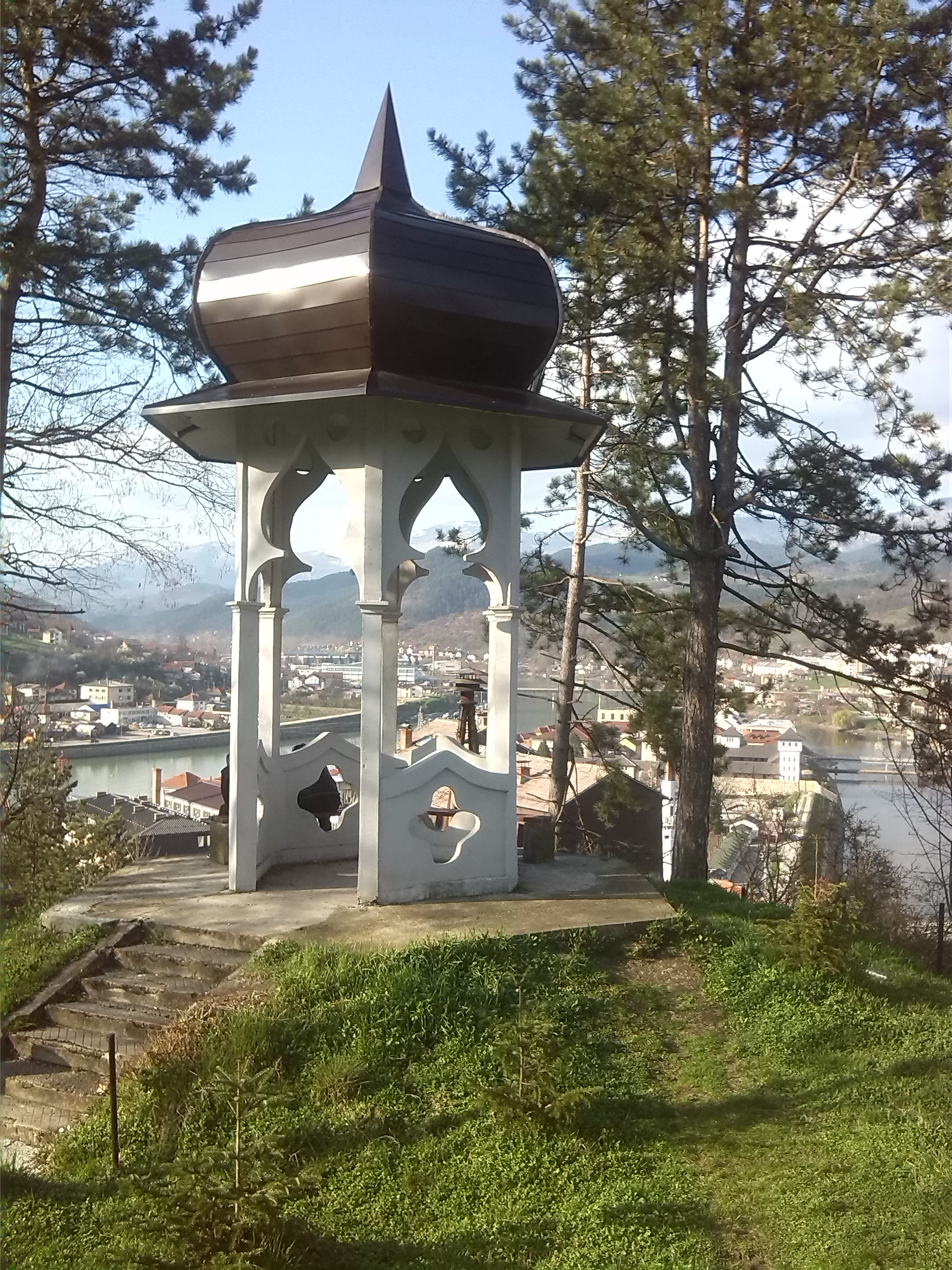 HLADNJAK NA BIKAVCU